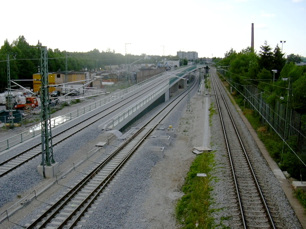 Beispiel eines Überwerfungsbauwerkes. Dieses befindet sich am Abzweig der eingleisigen Bahnlinie Giesing — Kreuzstraße aus der seit 2003 zweigleisigen Strecke München-Ost — Giesing — Deisenhofen. Dabei wird das stadtauswärts führende Richtungsgleis nach Deisenhofen (im Bild ganz links) über das Gleis Richtung München-Ost geführt. Der Grund dafür ist nicht nur ein kreuzungsfreies Ausfädeln, sondern auch die Tatsache, daß zwischen hier und München-Ost im Gegensatz zu den in Deutschland üblichen Konventionen im Linksbetrieb gefahren wird. Die Gleisbelegung in Vordergrund ist: nach Deisenhofen — von Deisenhofen — von/nach Kreuzstraße . Der Blick geht Richtung Giesing.